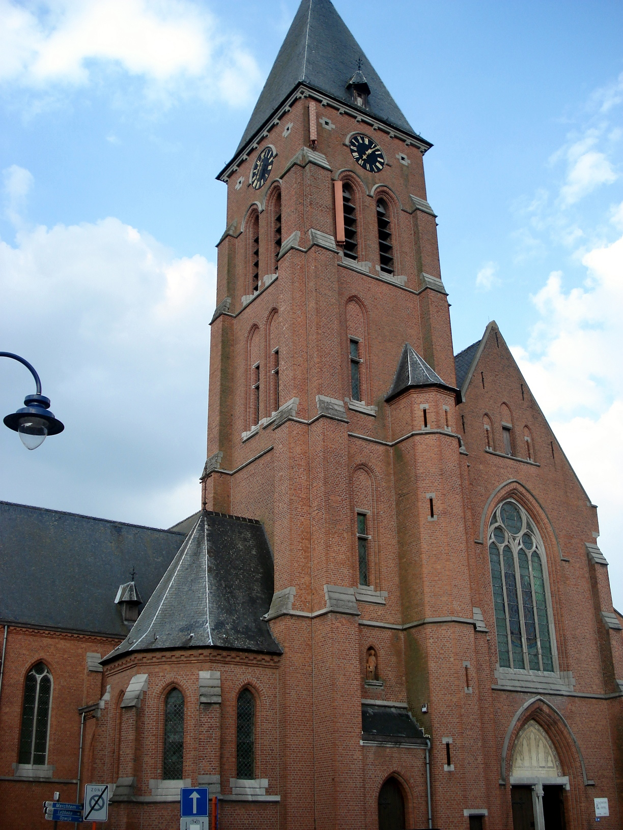 Opstal, wijk in gemeente Buggenhout, prov. Oost-Vlaanderen, België. Neogotische St.-Gerardus Majellakerk, 1908, n.o.v. arch. Henri Valcke.